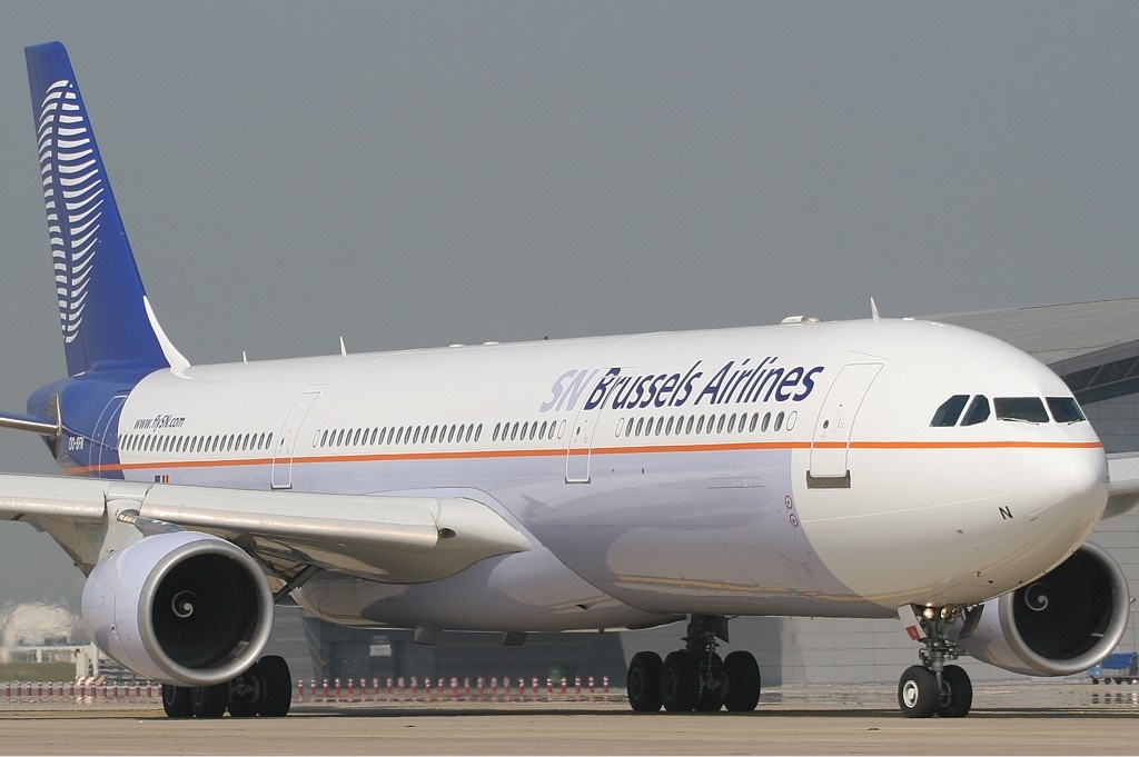 SN Brussels Airlines Airbus A330-300